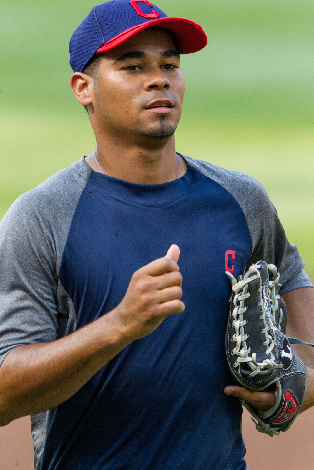 Esmil Rogers